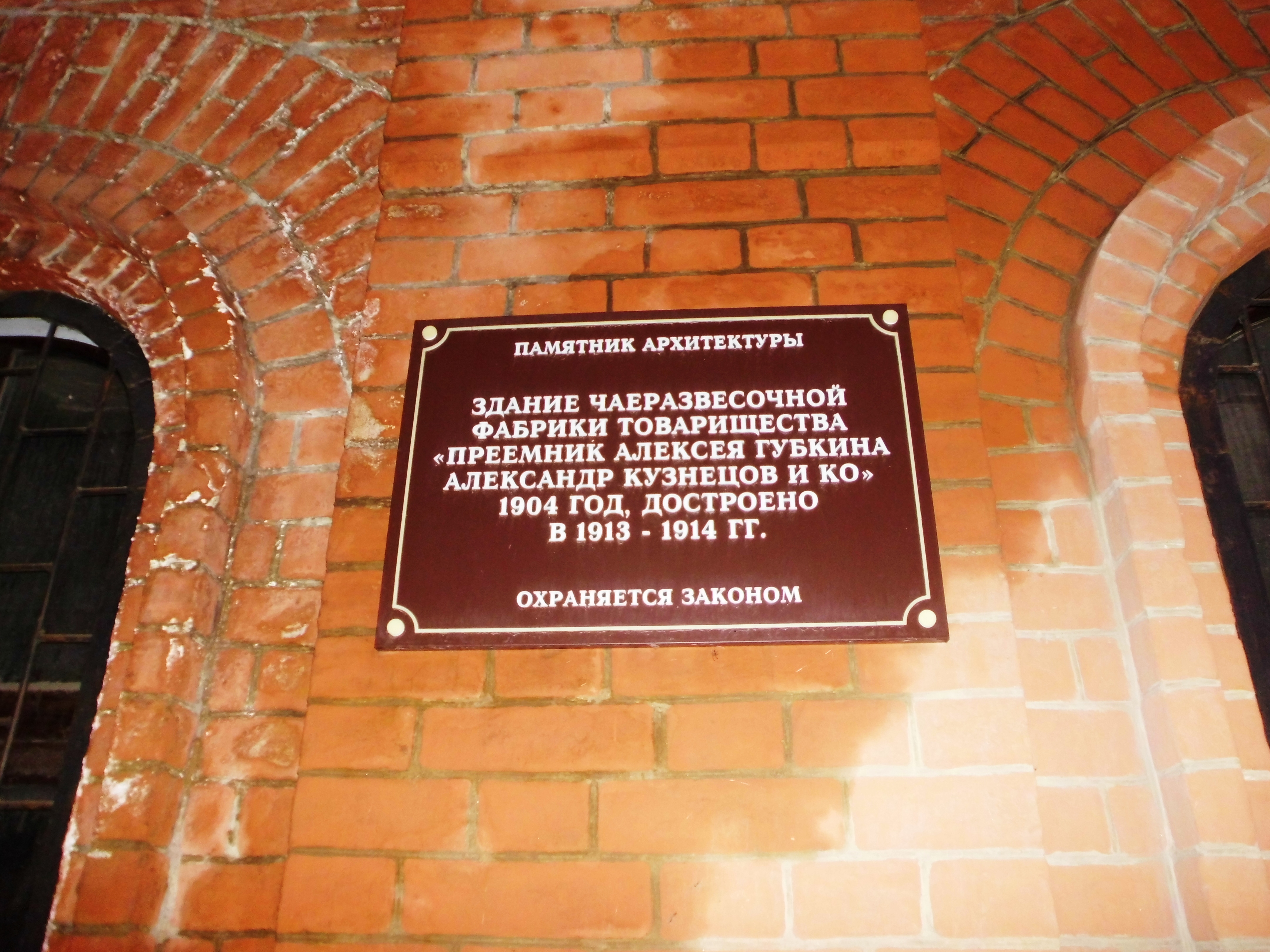 Чаеразвесочная фабрика Кузнецова: улица Васенко, 37, Челябинск, Челябинская область. Табличка о статусе здания на фасаде со стороны проезжей части улицы.